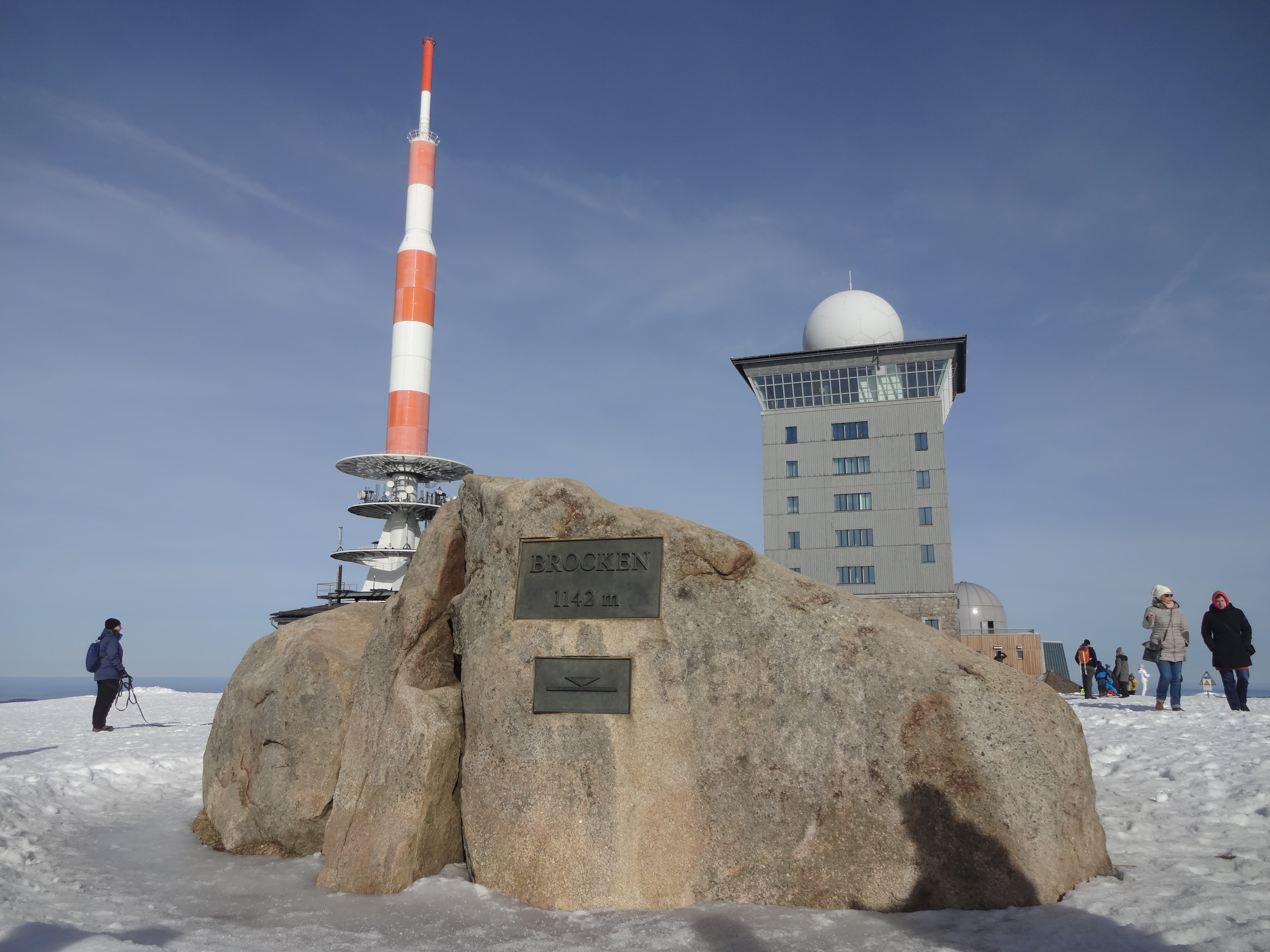 Sendeanlagen auf dem Brocken